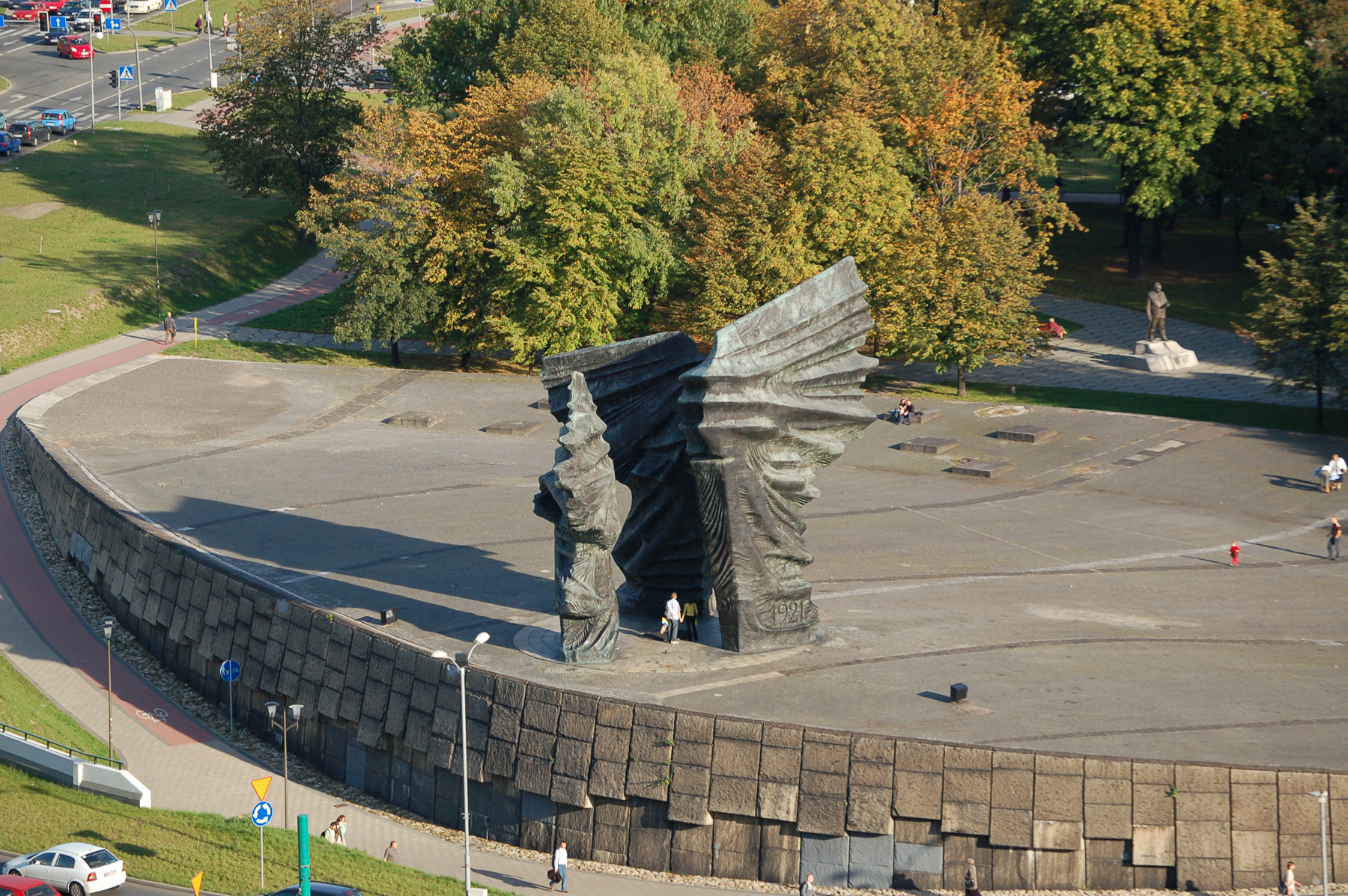 Pomnik